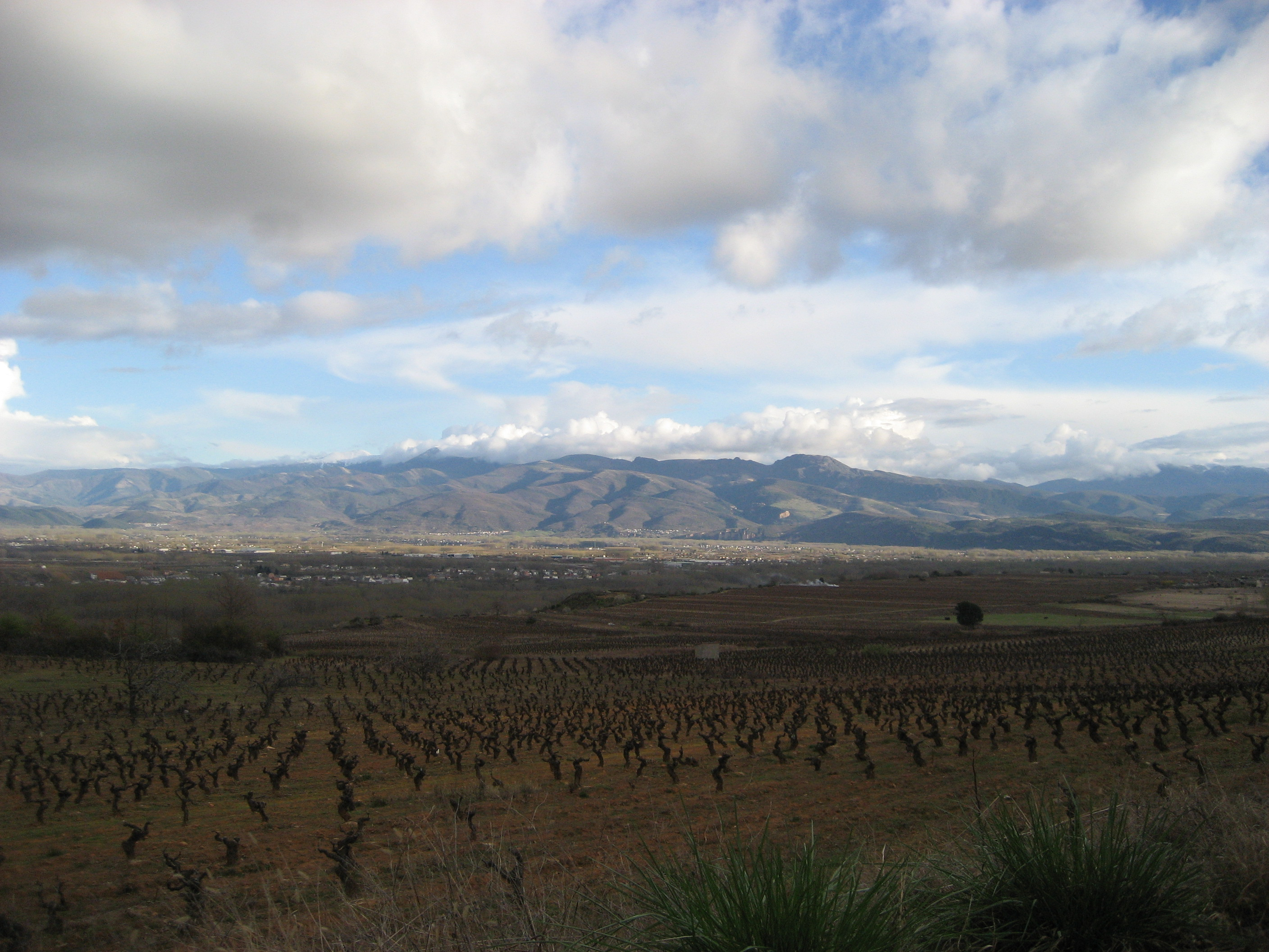 Viñas bercianas. Cerca de Cacabelos (El Bierzo, León, España)